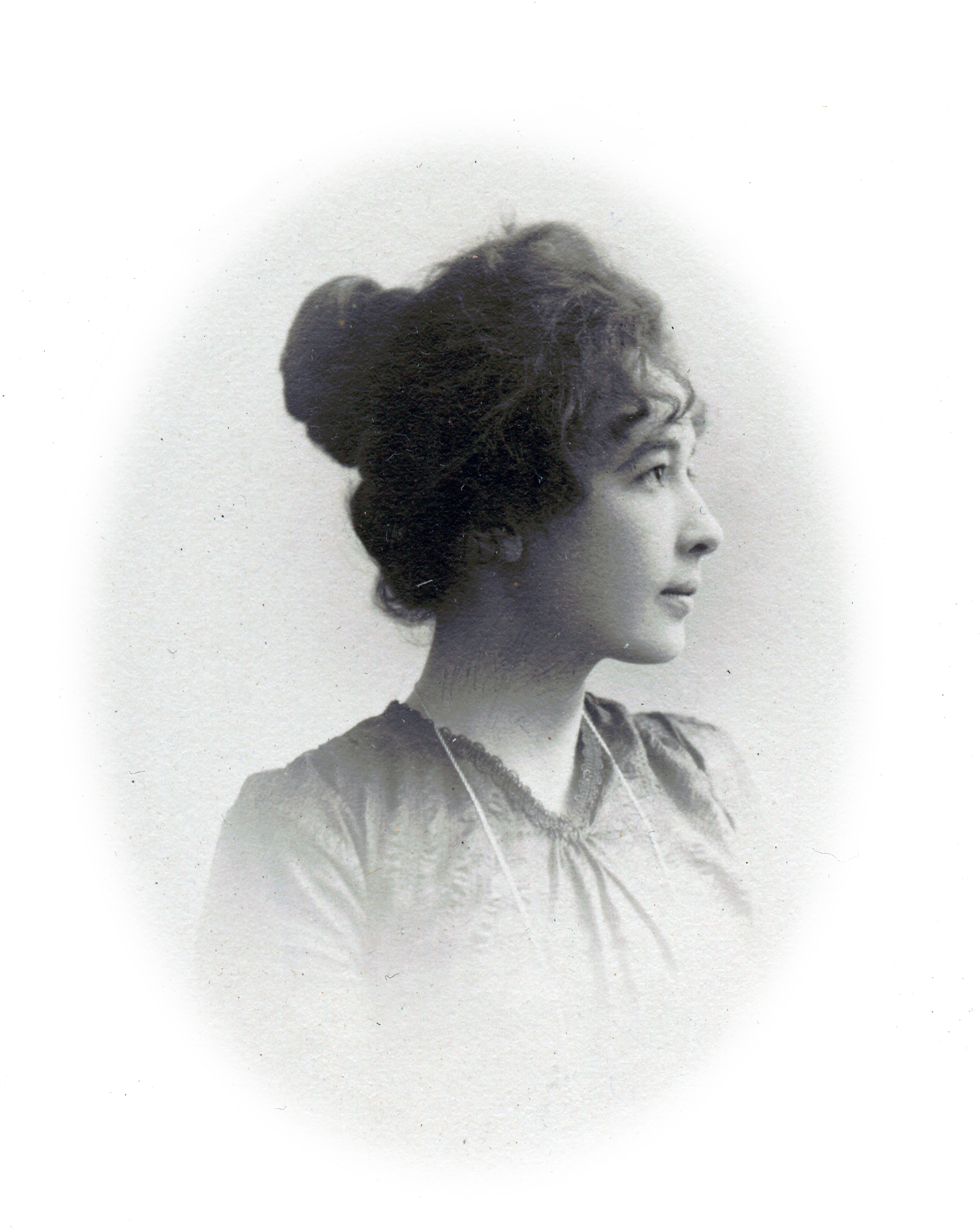 Harriet Bosse, skådespelare vid Dramatiska teatern 1899-1900